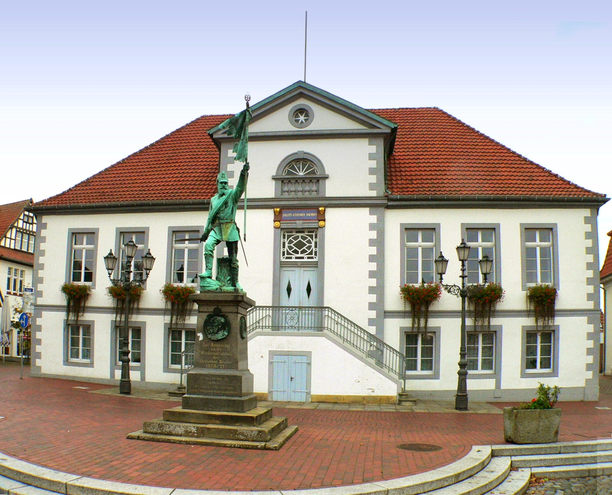 Rathaus von Quakenbrück, Deutschland, mit Kriegerdenkmal von 1871